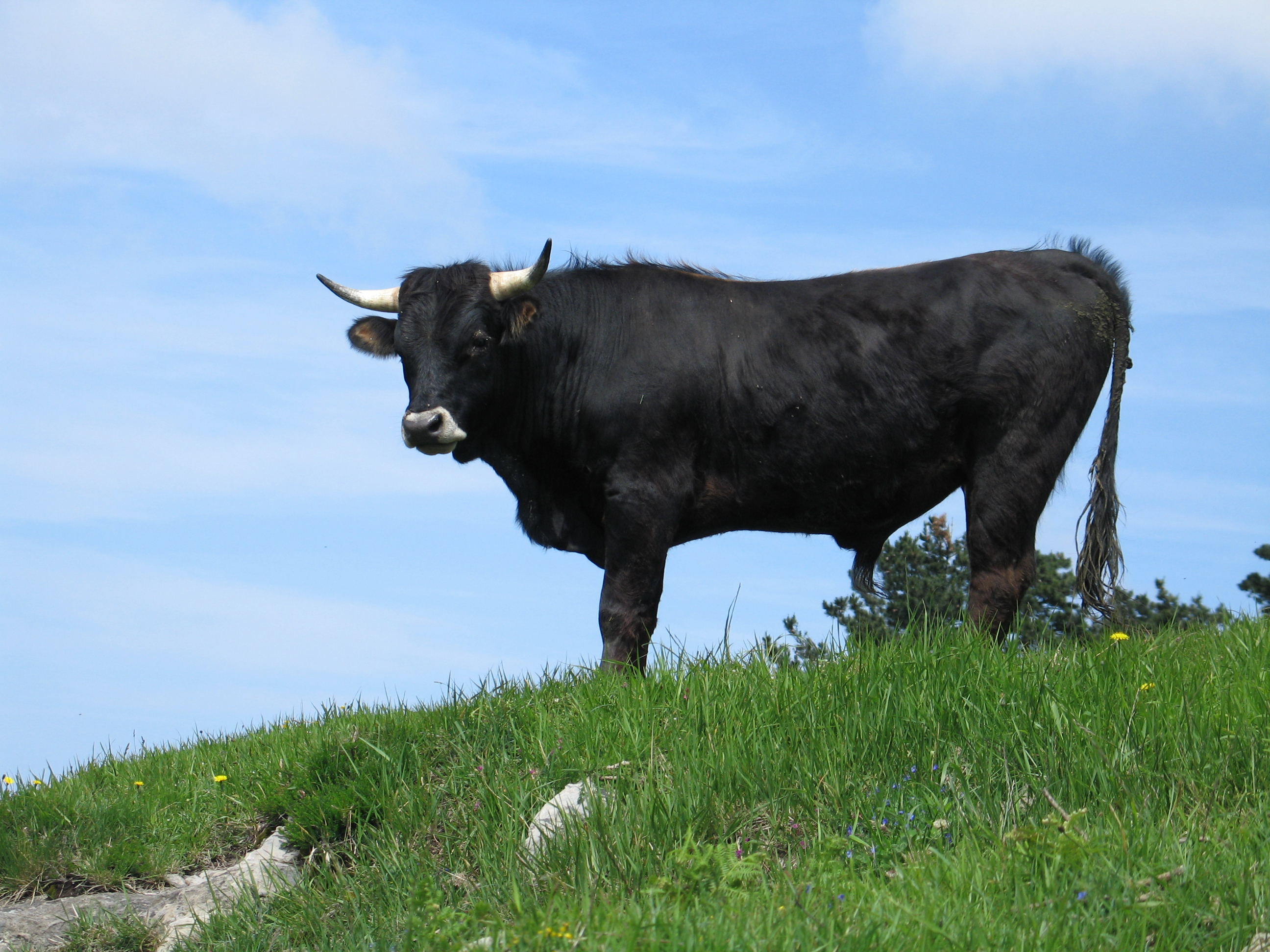 Terreña arrazako zezena